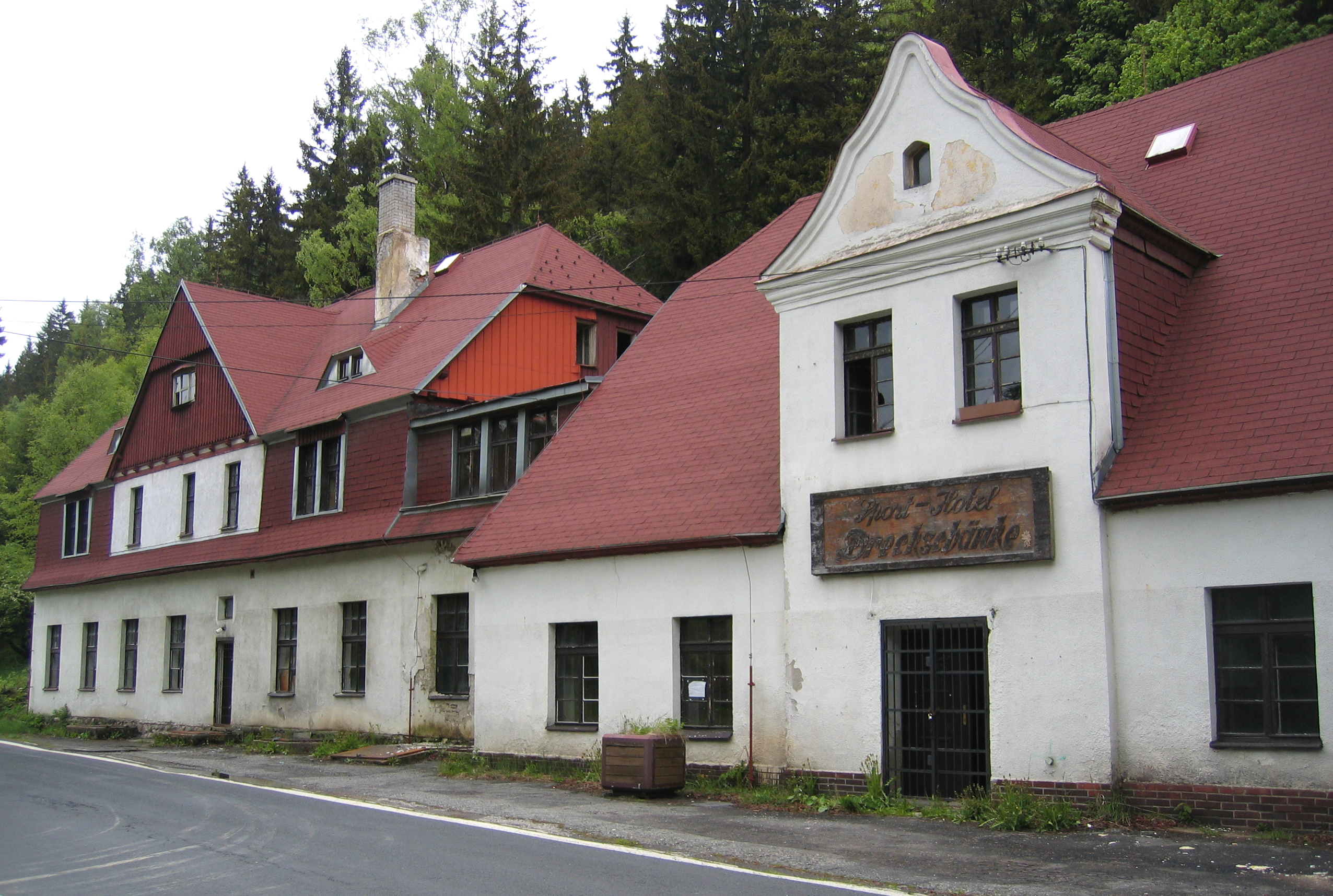 Dreckschänke